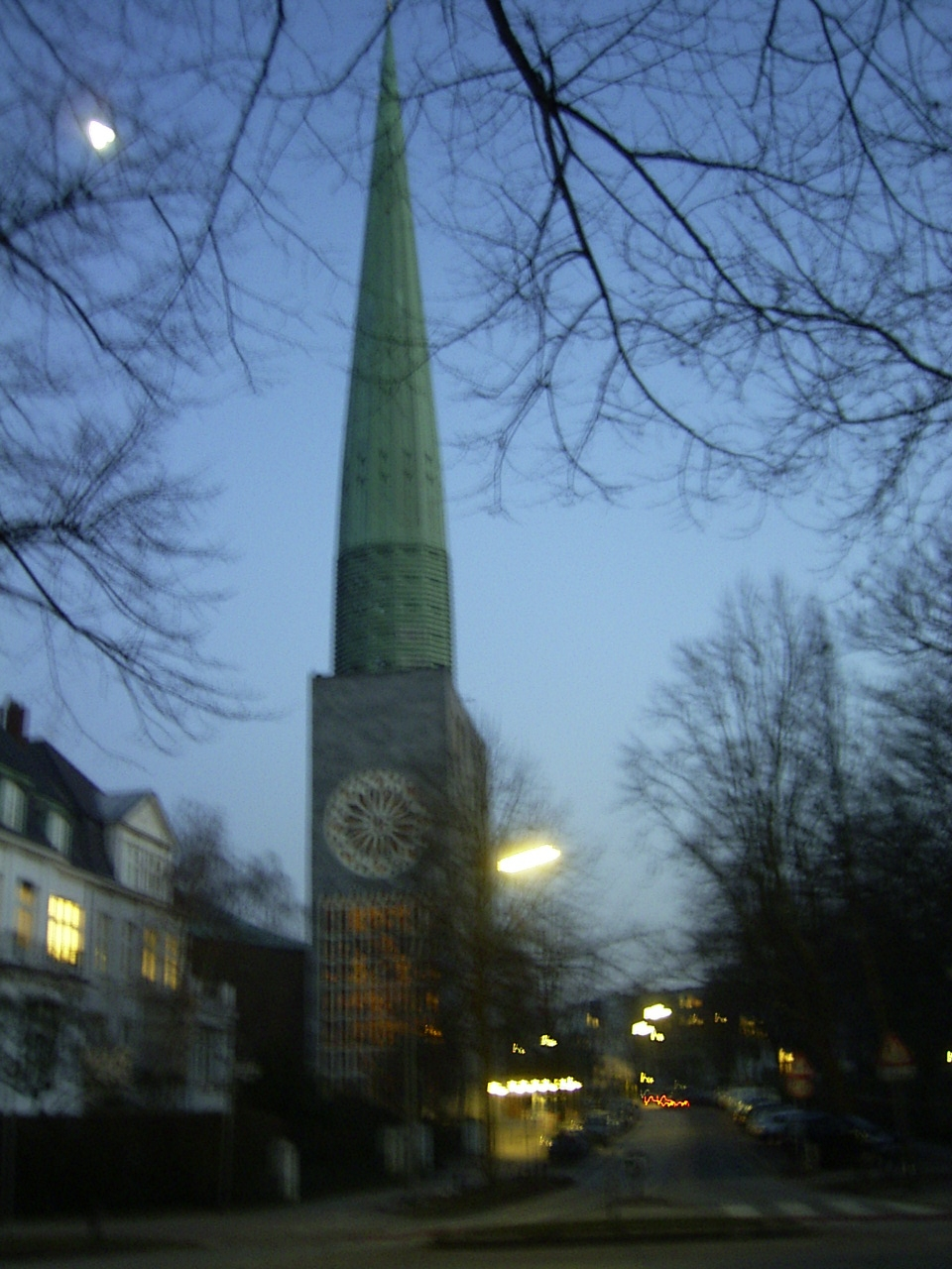 St. Nikolaikirche in Hamburg-Harvestehude in der Abenddämmerung vom Klosterstern aus photographiert.